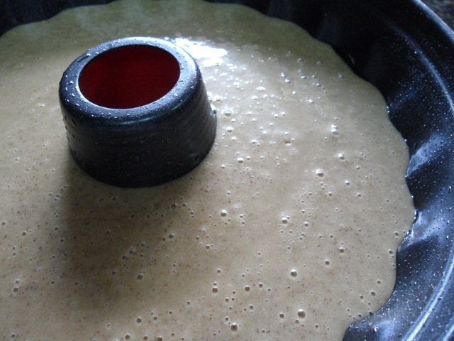 הכנת עוגת דבש